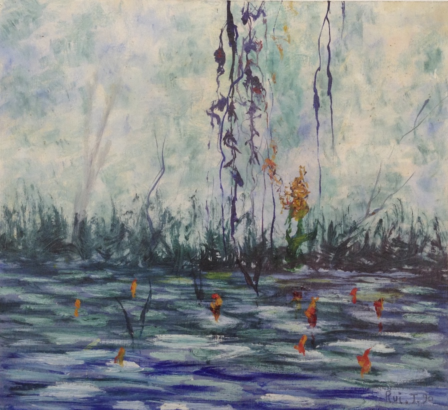 Huile impressioniste : les nénuphars du jardin botanique de Tahiti.